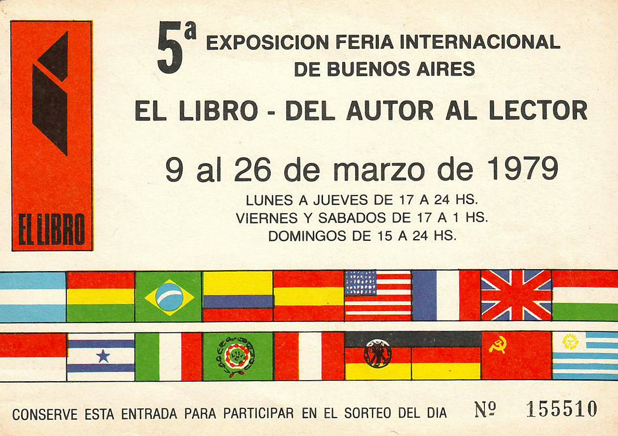 Entrada a la 5ta. Feria Internacional del Libro de Buenos Aires, 1979